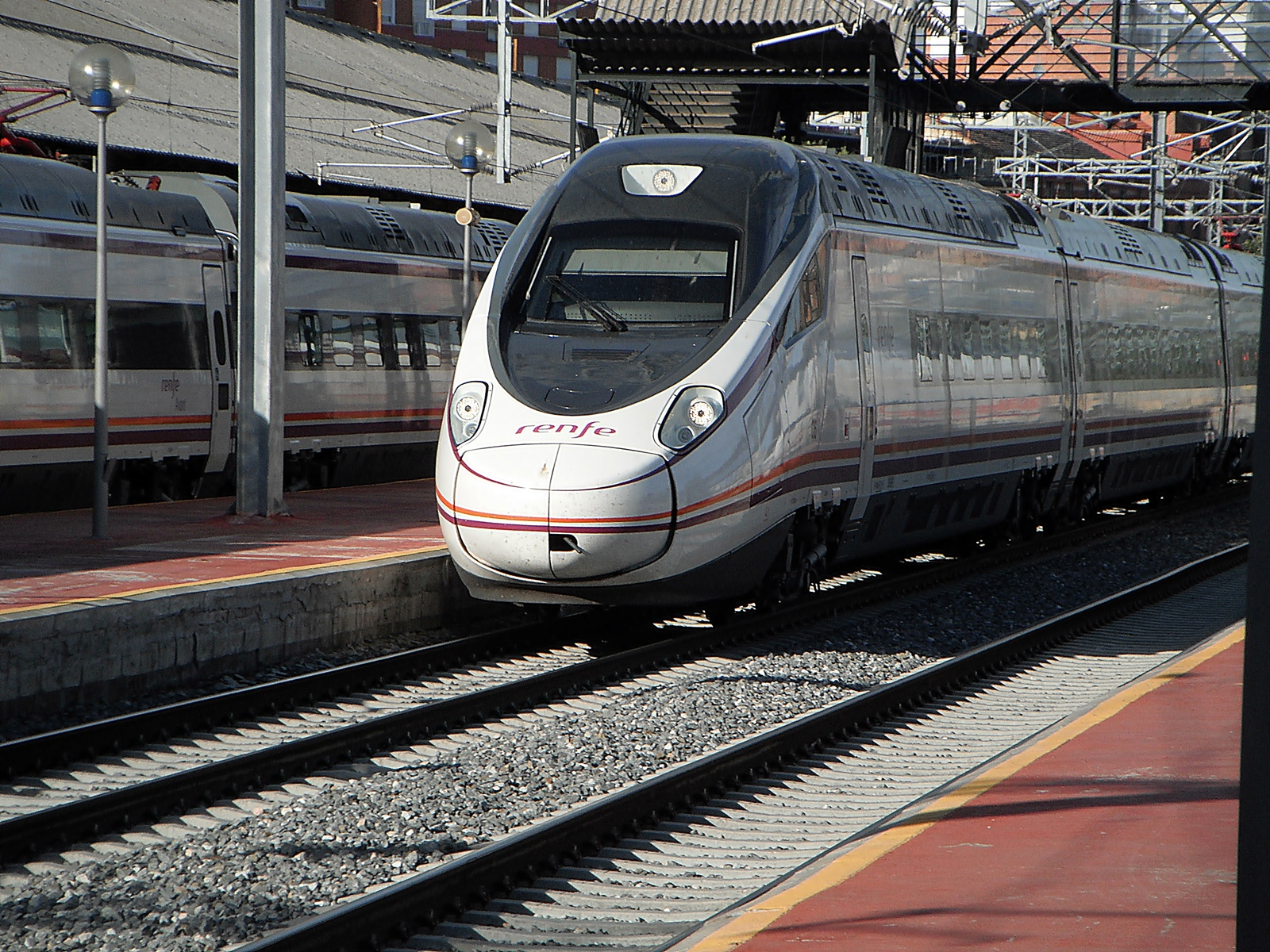 Tren de la serie 114 dejando su aparcamiento para dirigirse al andén de pasajeros